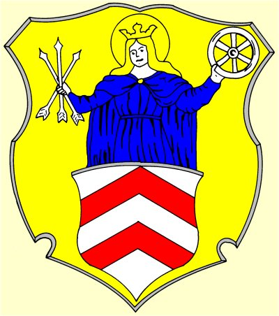 Ursula von Köln - Wappen der Stadt Oberursel.